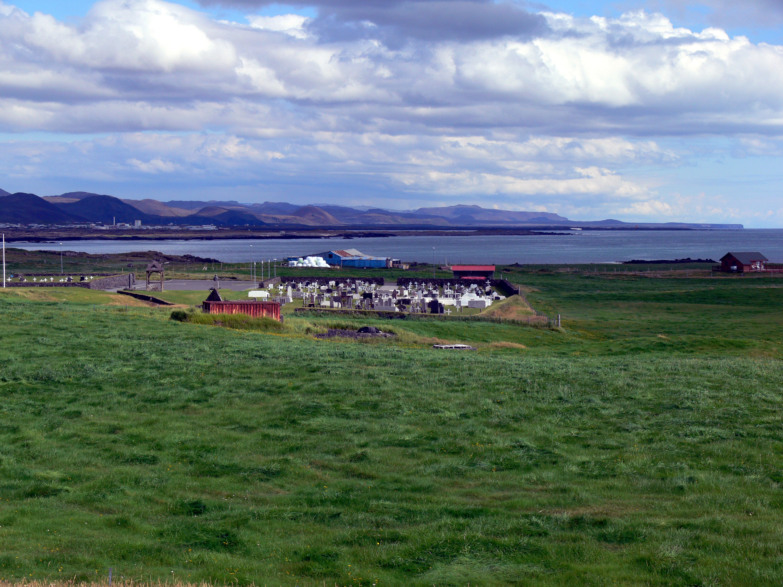 Grindavík. Vorne die alte Siedlungsfläche mit Friedhof, im Hintergrund die moderne Stadt.